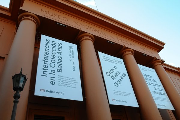 Fachada del Museo